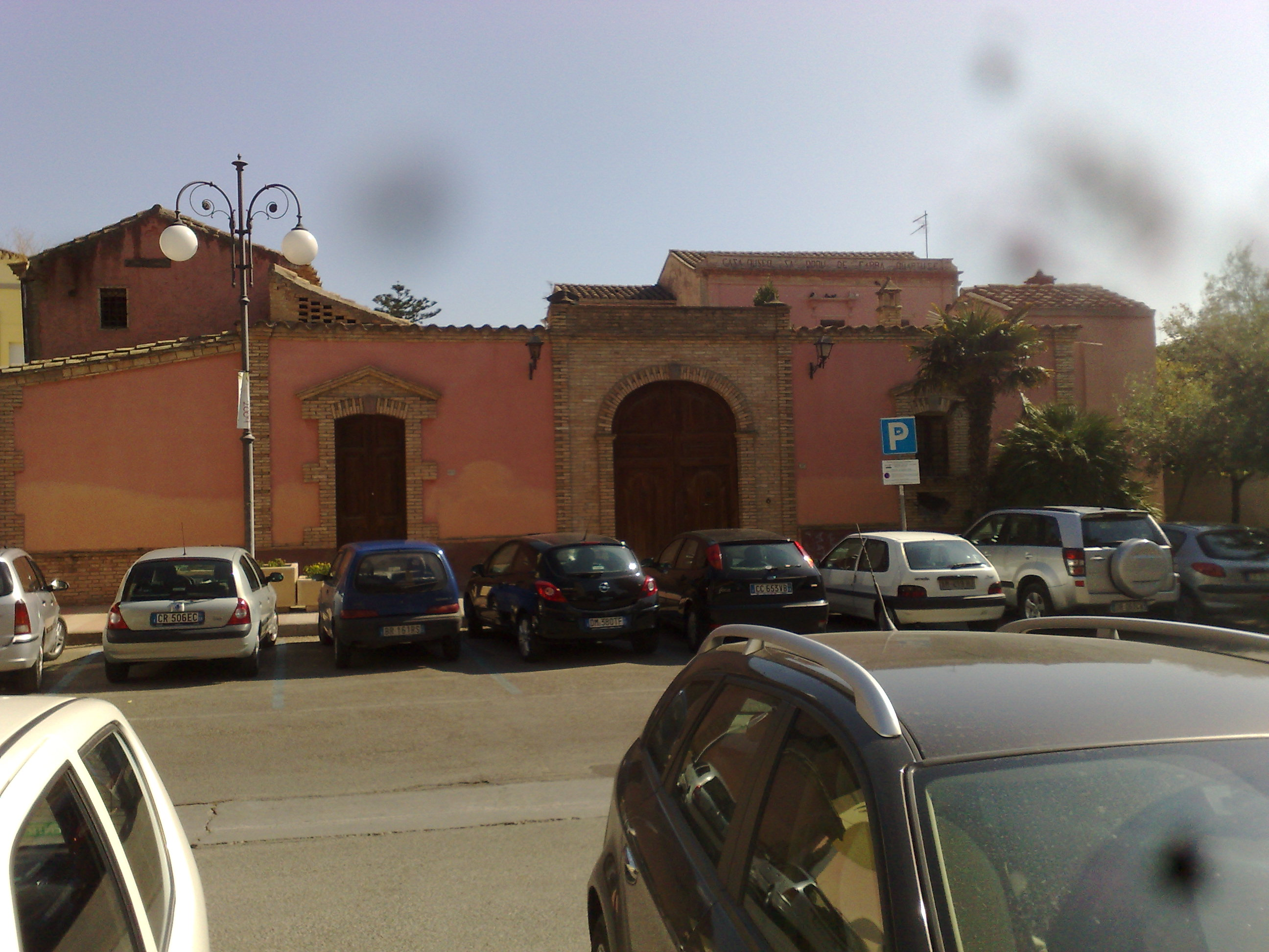 Sa dom'e farra. Foto scattata da me l'11 settembre 2009 con cellulare N95